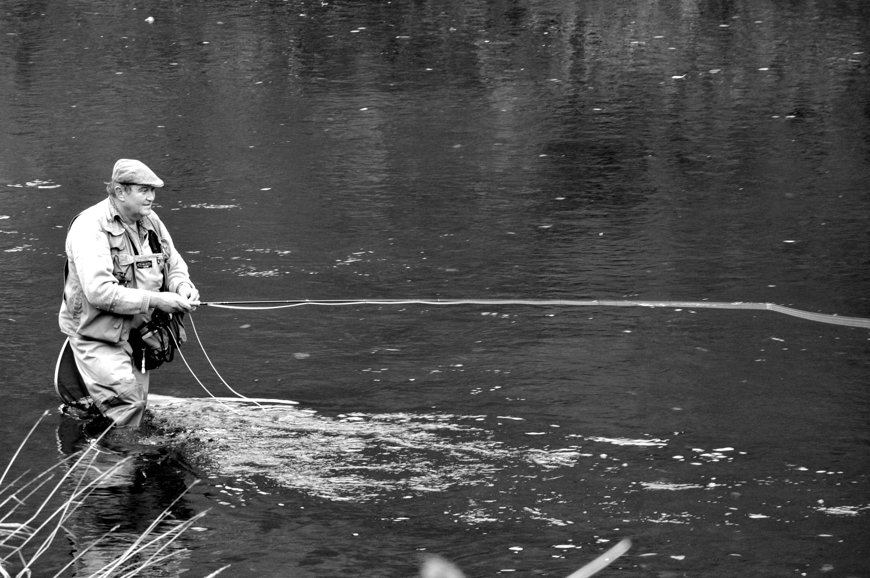 Zu Méchela.